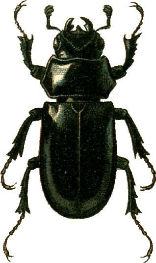 This file has been extracted from another file: Jacobs27.jpg